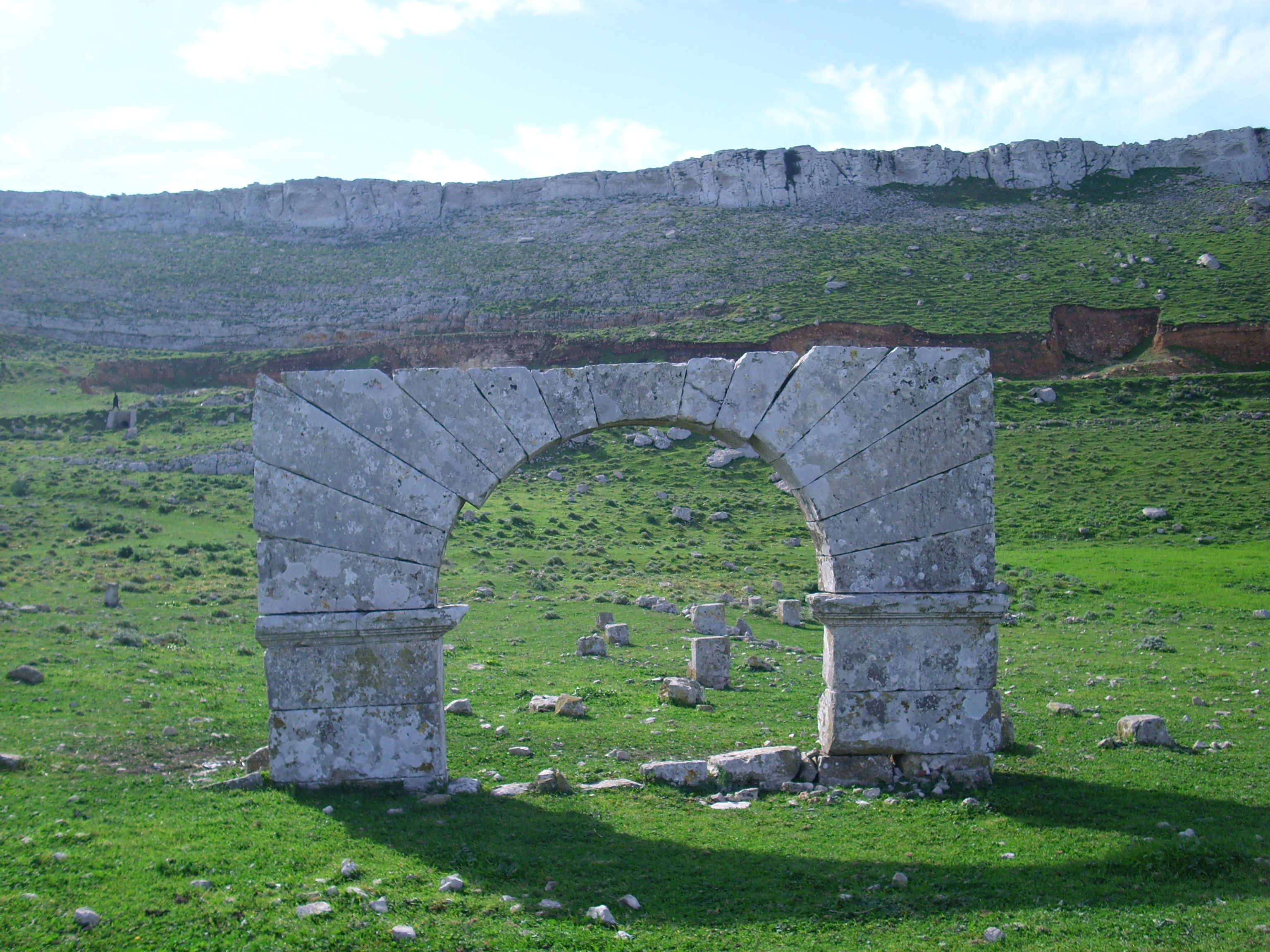 En arrière-plan: le djebel Gorra. En avant-plan: Arc de Triomphe de Kouchbatia au pied du djebel Gorra.